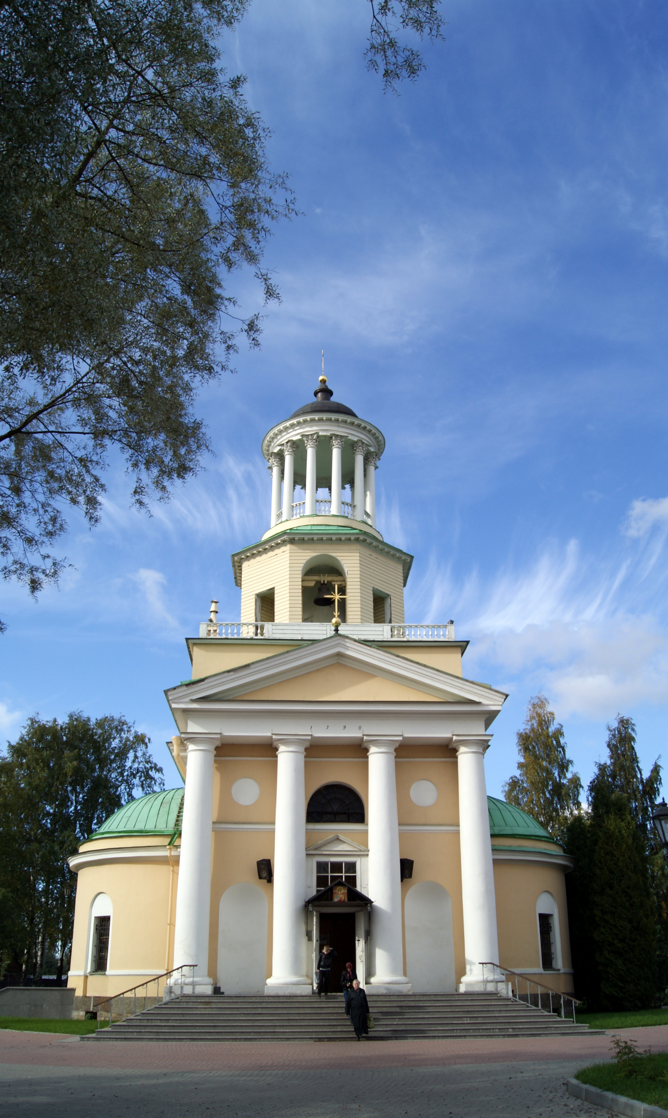 Церковь великомученицы Екатерины: улица Кооперативная, 21, Мурино, Всеволожский район, Ленинградская область